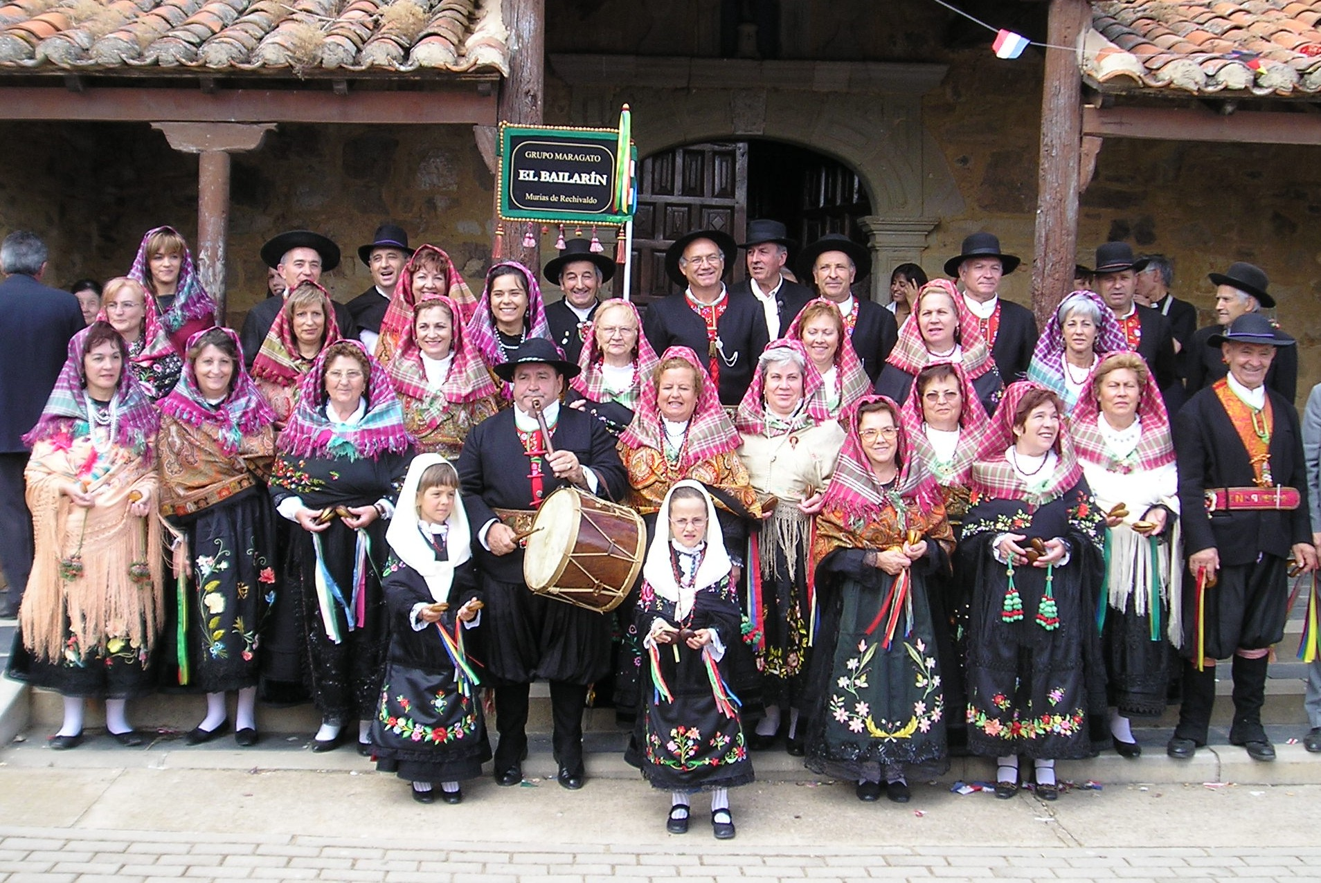 Grupo de maragatos de Murias de Rechivaldo (León, España).